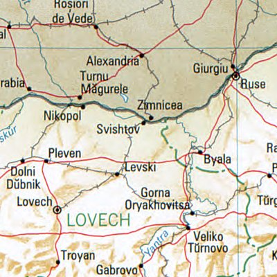 Svishtov_1994_CIA_map.jpg